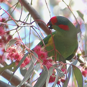 Bird, Musk Lorikeet, Glossopsitta concinna